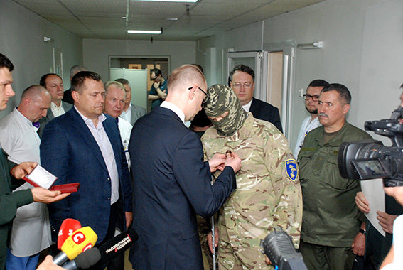 Премьер-министр Украины награждает Семена Семенченко орденом Богдана Хмельницкого